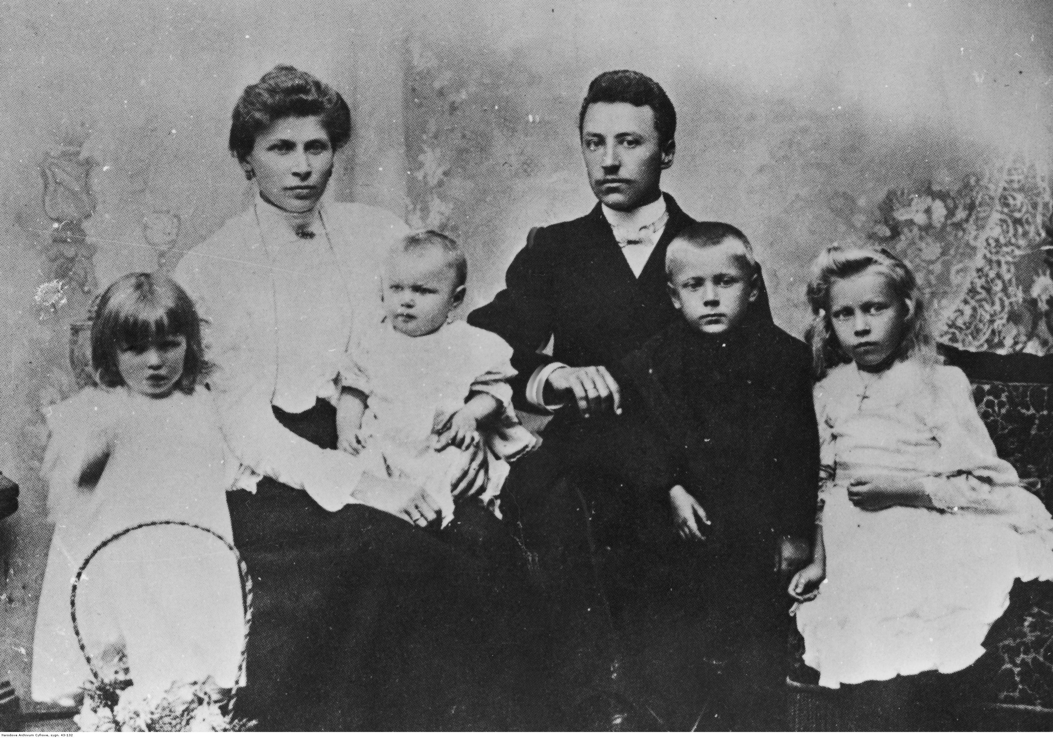 Rodzina prymasa Polski kard. Stefana Wyszyńskiego (Julianna Wyszyńska z domu Karp, Stanisław Wyszyński, poniżej od lewej: Stanisława Wyszyńska (później Stanisława Jarosz), Janina Wyszyńska, Stefan Wyszyński i Anastazja Wyszyńska (później Anastazja Sułek))